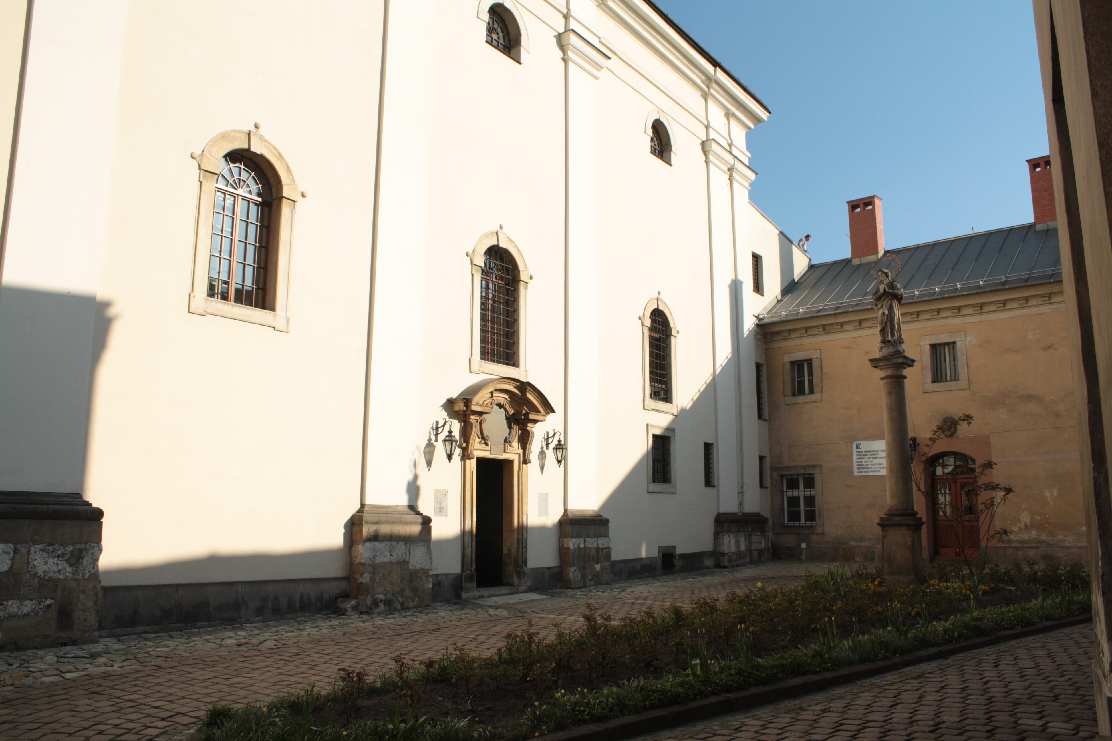 Kościół Matki Boskiej Śnieżnej w Krakowie